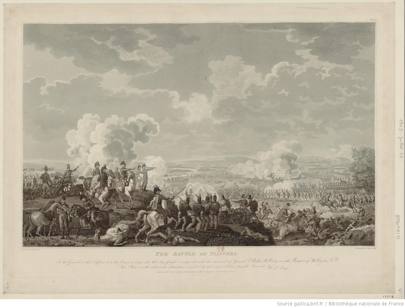 Batalla de Talavera 1809